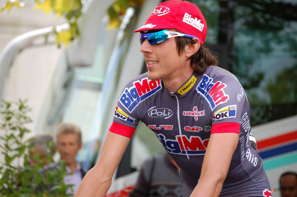 Stephane Rossetto